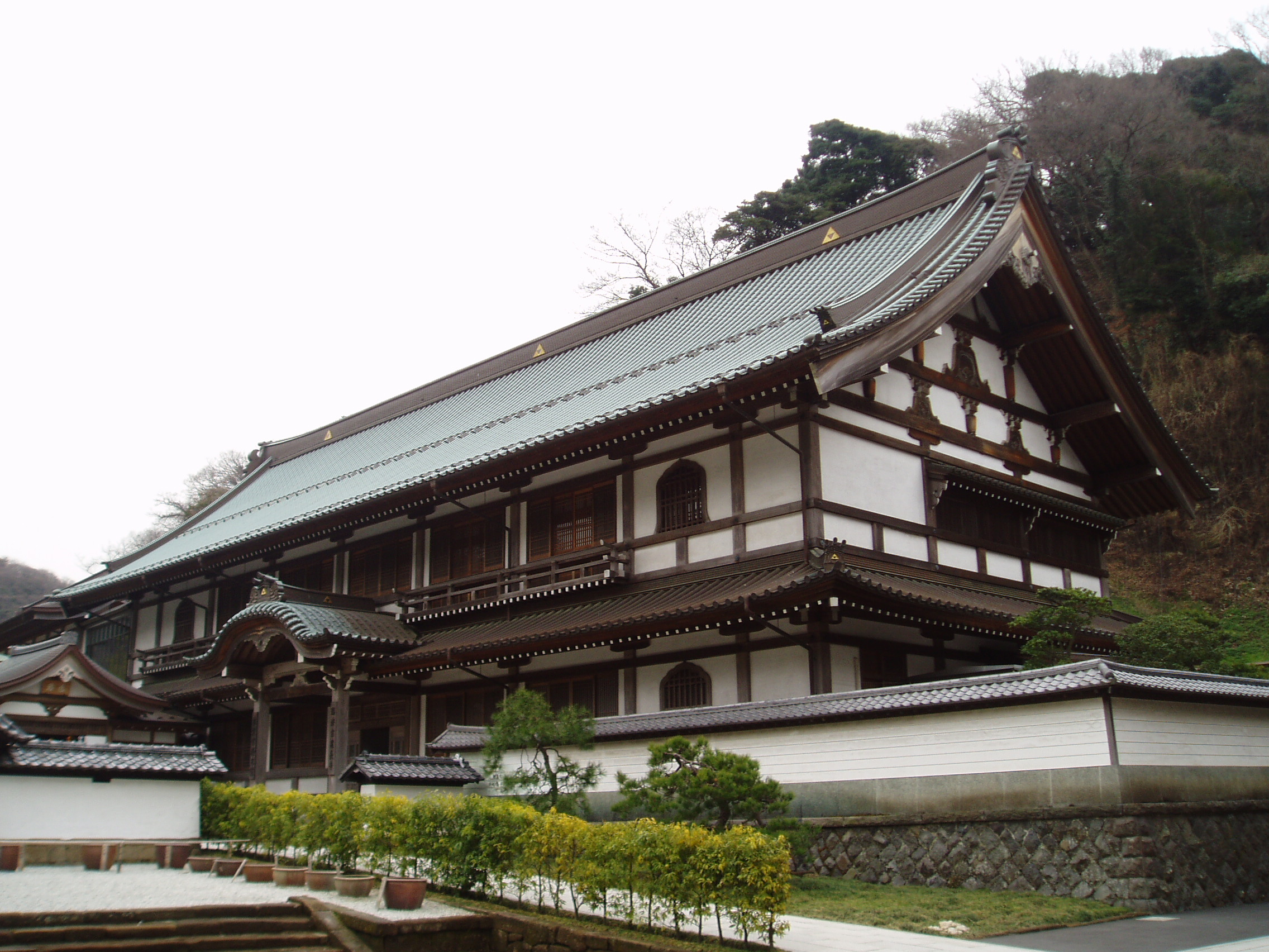 The temple Kencho-ji in Kamakura, Kanagawa, Japan